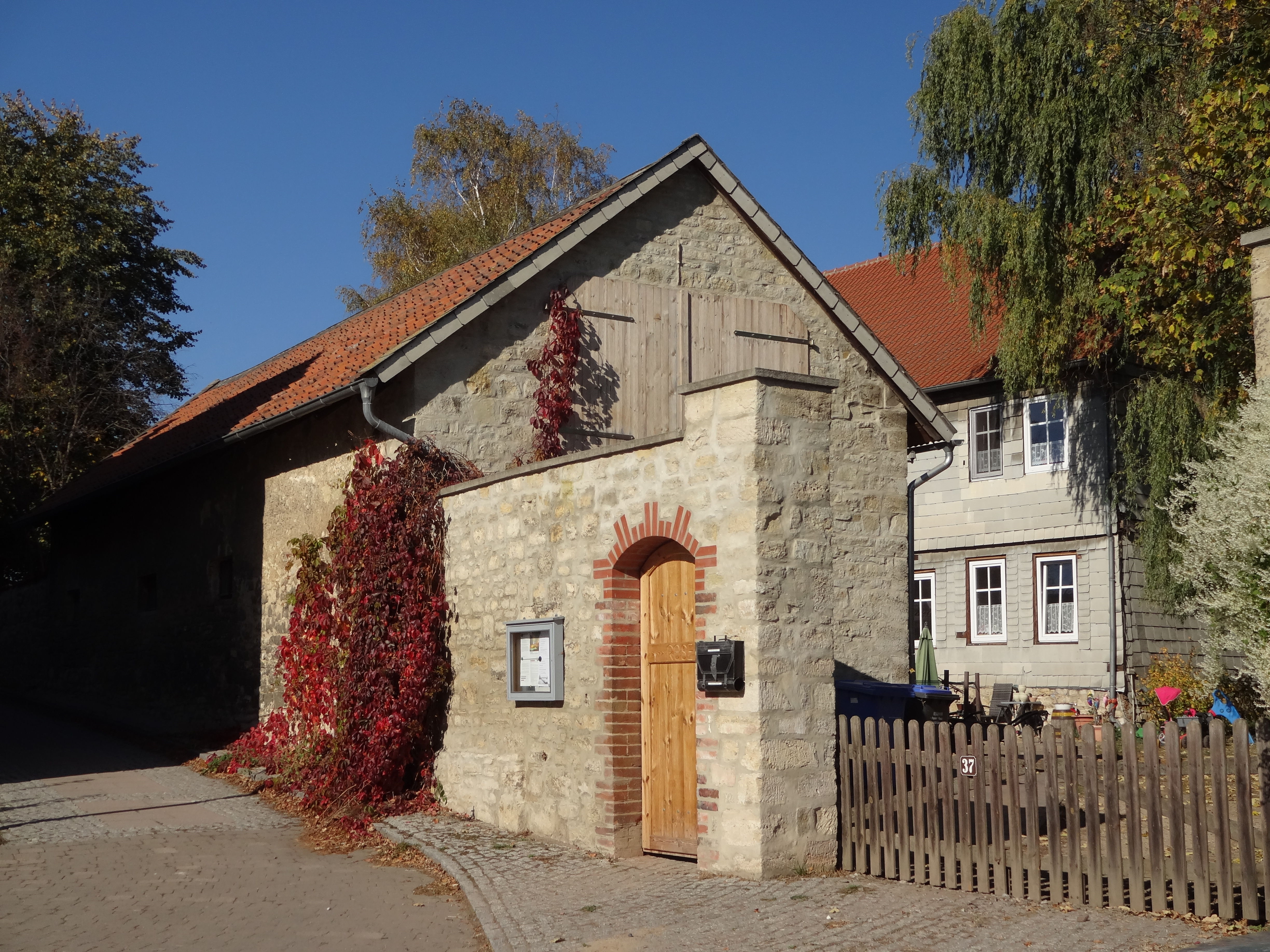 denkmalgeschütztes Pfarrhaus in der Kirchstraße 37 in Zilly